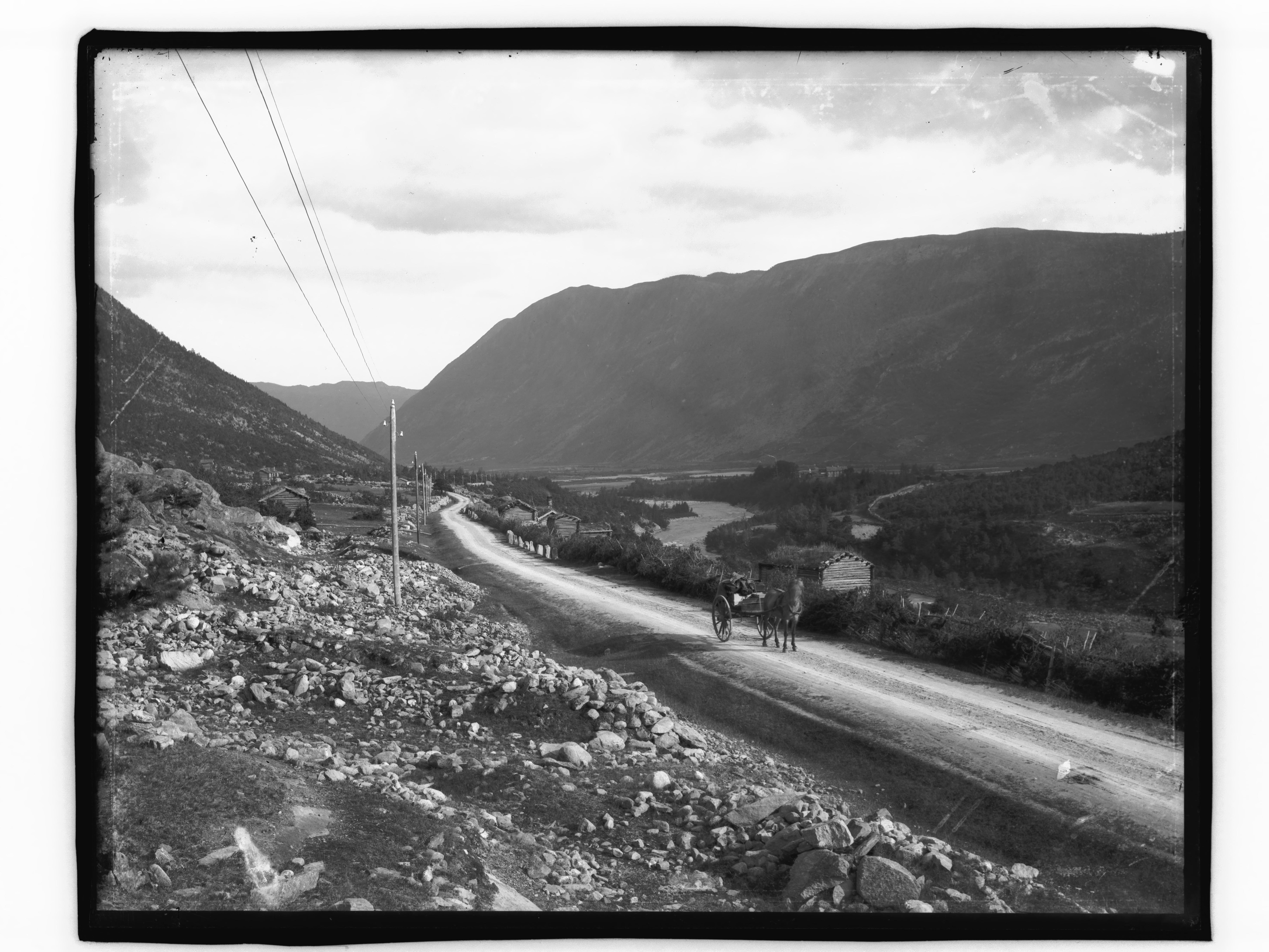 Nord-Sel i Gudbrandsdalen. Utsikt sørover mot Selsmyrene. Påskrift konvolutt: Trang dal Nordvestlandet? [Riksantikvaren] Sted: Nord-Sel Kommune: Sel Fylke: Oppland Tagger: landskap dalføre elv kjerrevei hest og vogn